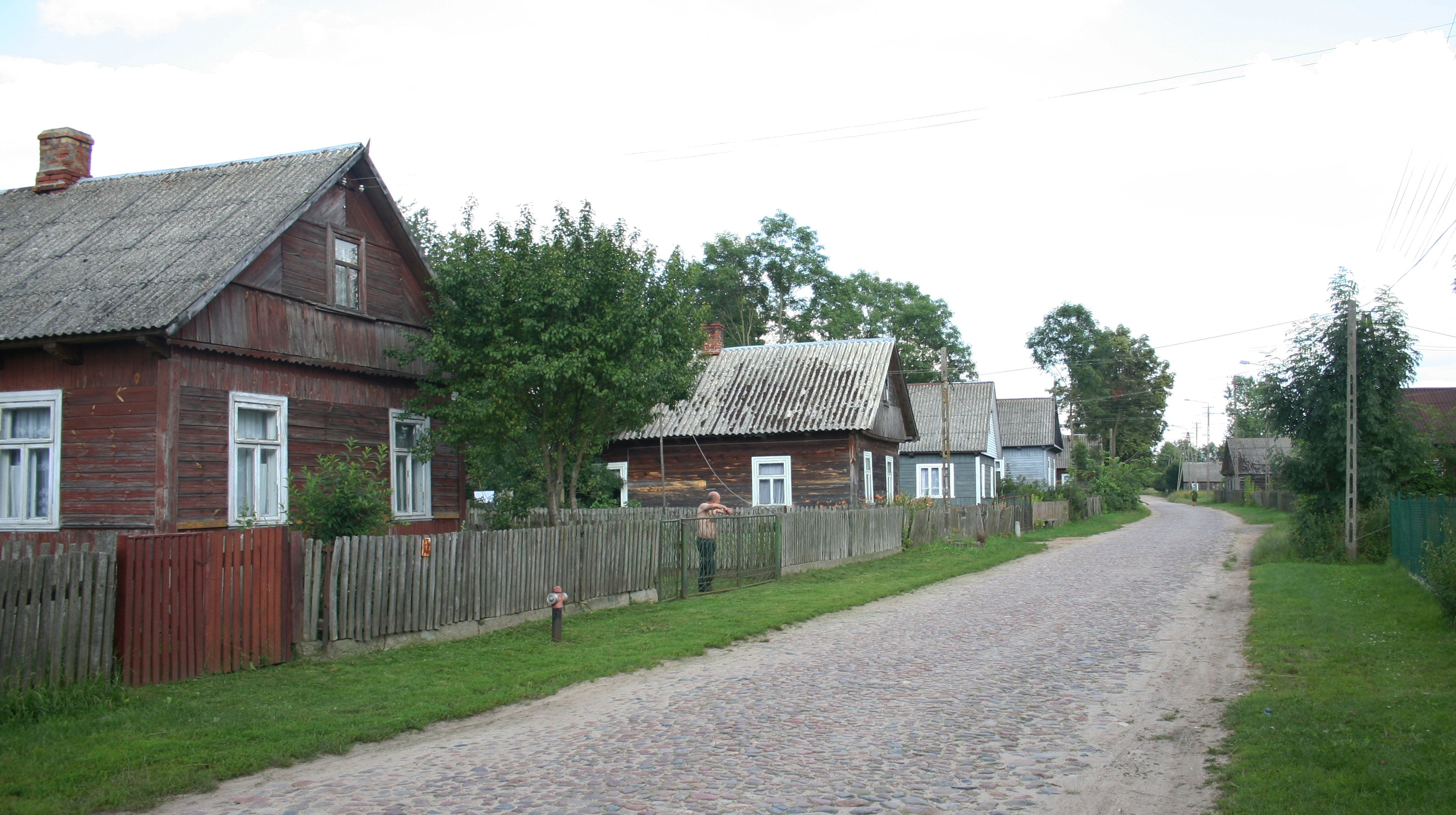 wieś Sasiny, gmina Boćki, woj. podlaskie